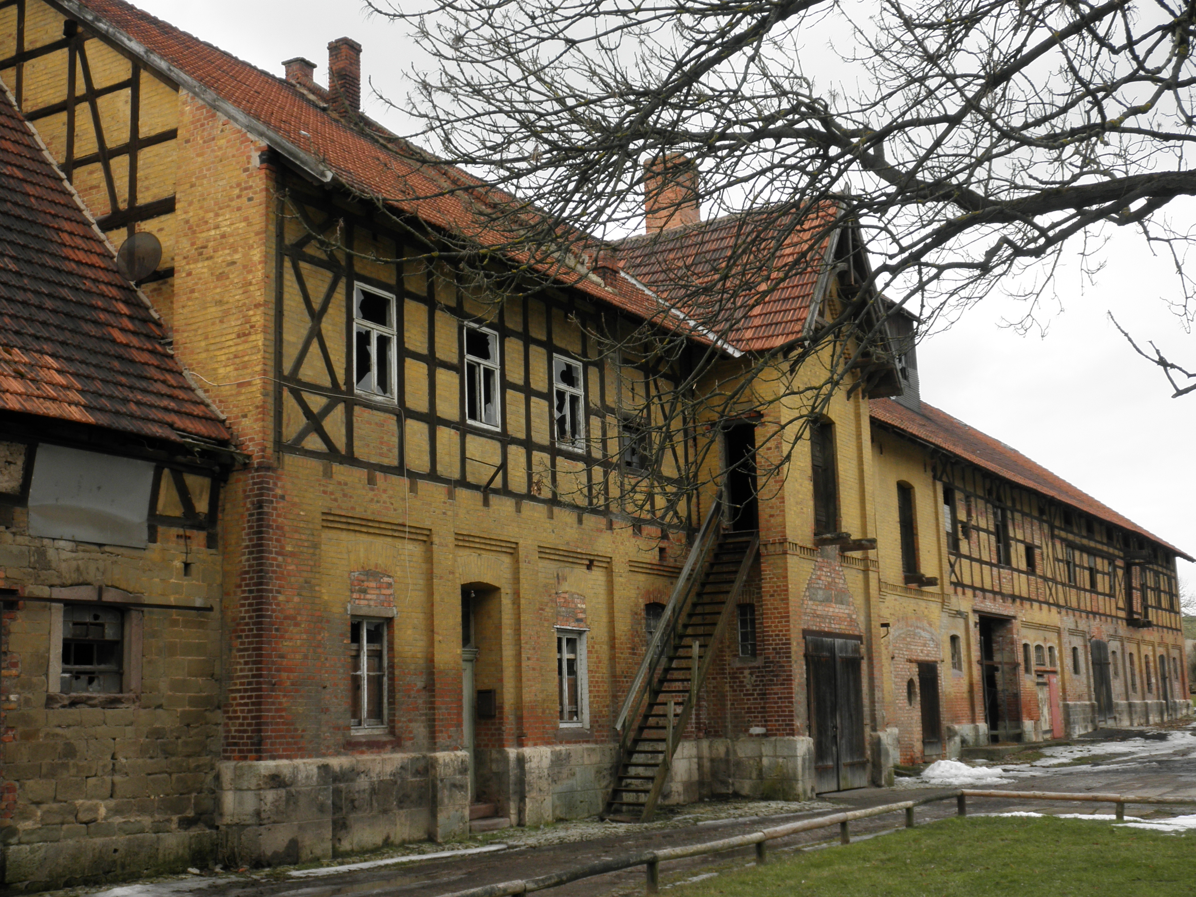 Wirtschaftsgebäude des ehemaligen Gutes in Kleinballhausen